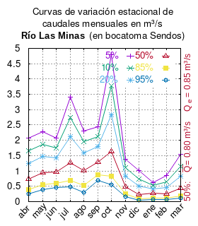 Curva de Variación Estacional río Las Minas en bocatoma Sendos. # cita publicación # | apellido = Dirección General de Aguas # | nombre = # | enlace-autor = Ministerio de Obras Públicas (Chile) # | título = Diagnóstico y clasificación de los cursos y cuerpos de agua según objetivos de calidad. Cuenca del río Las Minas # | ubicación = Santiago de Chile # | editorial = Ministerio de Obras Públicas (Chile) # | año = 2004 # | edición = # | url = # | urlarchivo = # | fechaarchivo = 20150924102050 # | ref = harv # Tabla 4.1: Río Las Minas en bocatoma Sendos (m3/s) pág. 30 mes 5% 10% 20% 50% 85% 95% abr 2.075 1.651 1.252 0.738 0.385 0.263 may 2.271 1.875 1.486 0.954 0.552 0.400 jun 2.075 1.756 1.434 0.974 0.605 0.457 jul 3.420 2.750 2.112 1.275 0.685 0.476 ago 2.309 1.952 1.581 1.019 0.520 0.293 sep 2.435 2.117 1.787 1.292 0.867 0.686 oct 4.782 3.771 2.828 1.632 0.829 0.557 nov 1.392 1.104 0.834 0.488 0.252 0.171 dic 1.009 0.734 0.499 0.239 0.096 0.057 ene 0.627 0.527 0.423 0.266 0.126 0.063 feb 0.846 0.648 0.468 0.252 0.118 0.075 mar 1.534 1.160 0.827 0.433 0.195 0.122 This plot was created with Gnuplot.